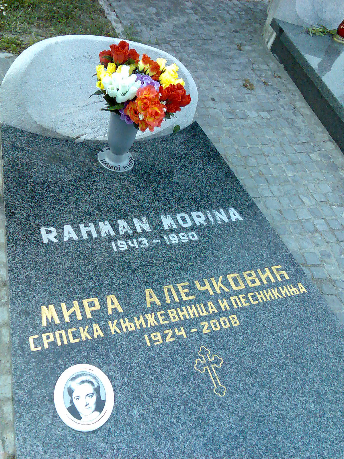 Гроб Мире Алечковић у Алеји великана на Новом гробљу у Београду. Уступио Срђа Николић, син Мире Алечковић.